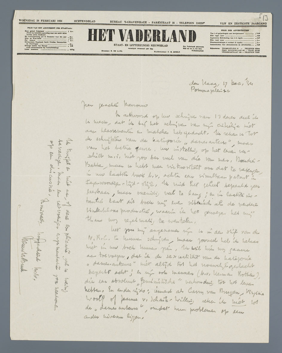 Brief van Menno ter Braak aan Marianne Philips (Eibergen, 26 januari 1902 – Den Haag, 15 mei 1940)